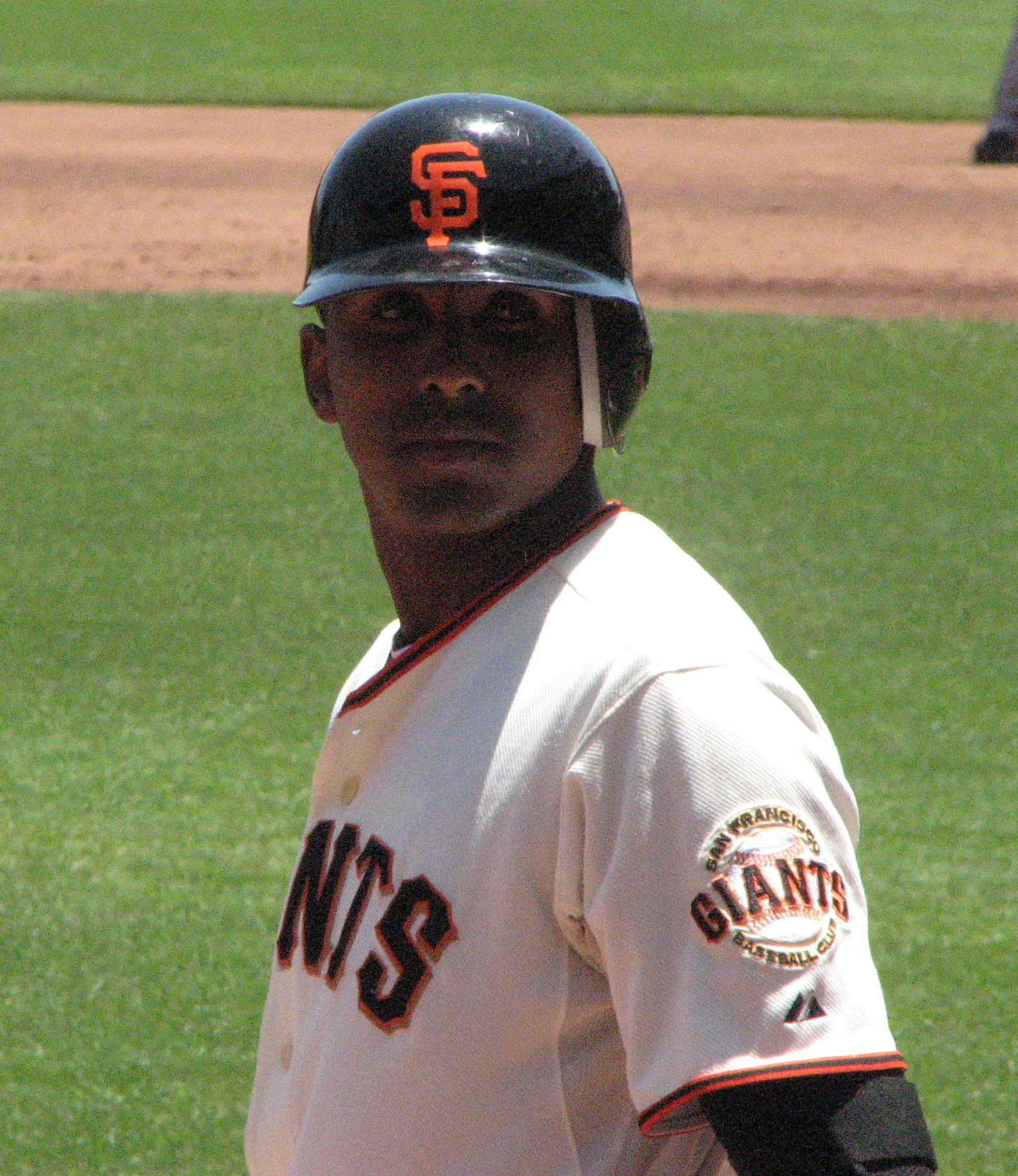 Joaquín Árias